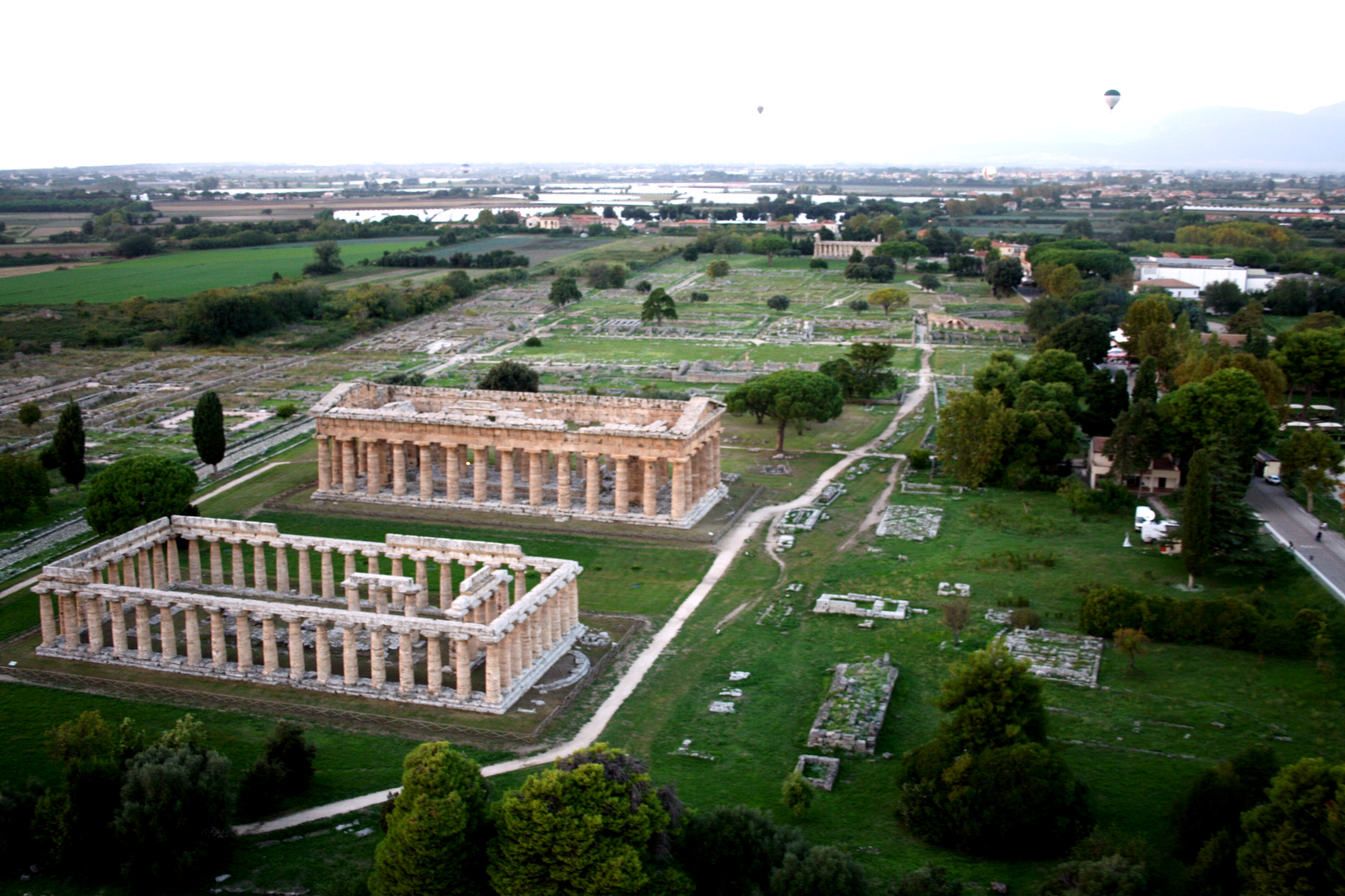 Area Archeologica di Paestum - MIBAC This is a photo of a monument which is part of cultural heritage of Italy.